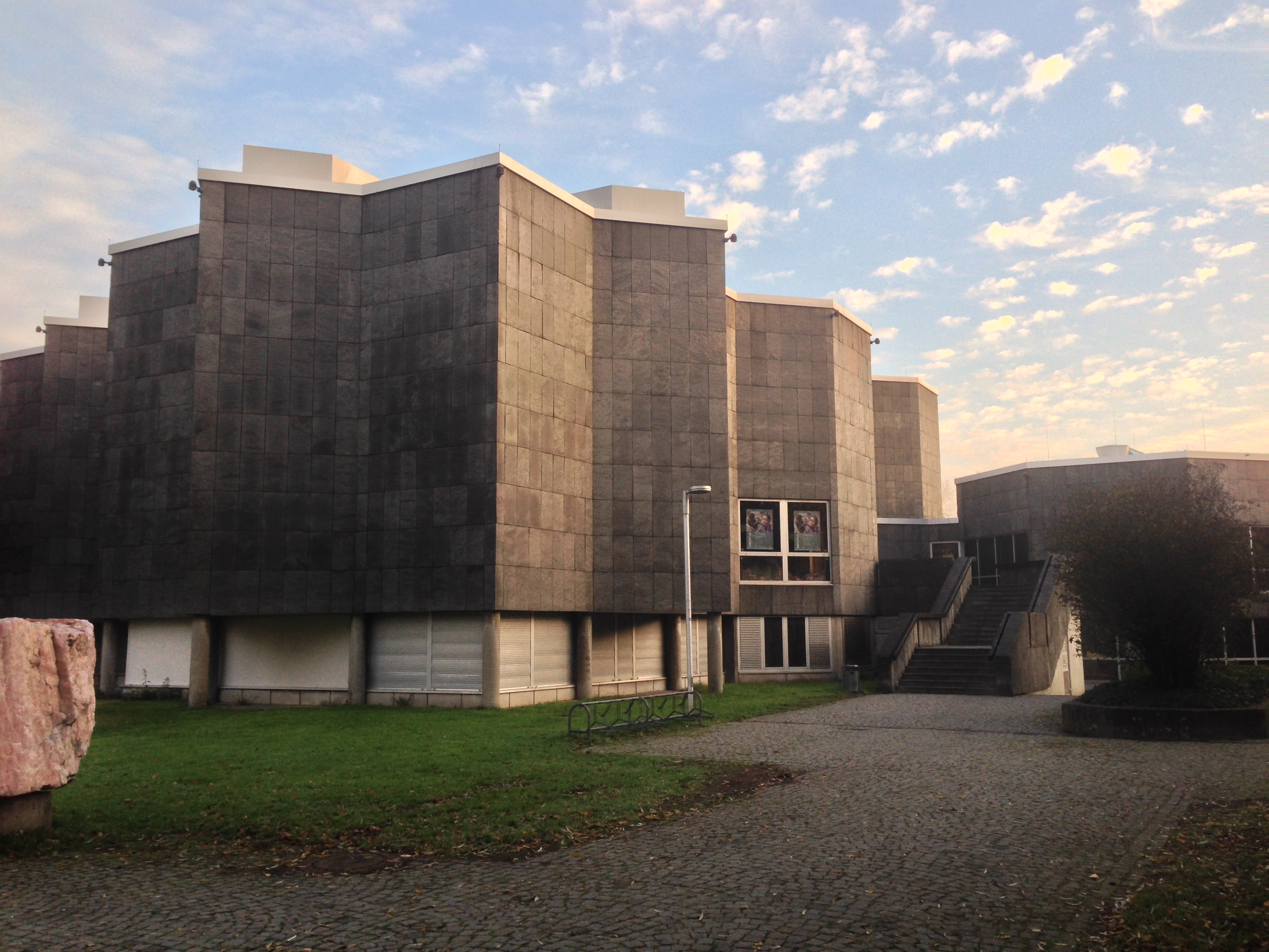 Museum für Naturkunde Fredenbaumpark